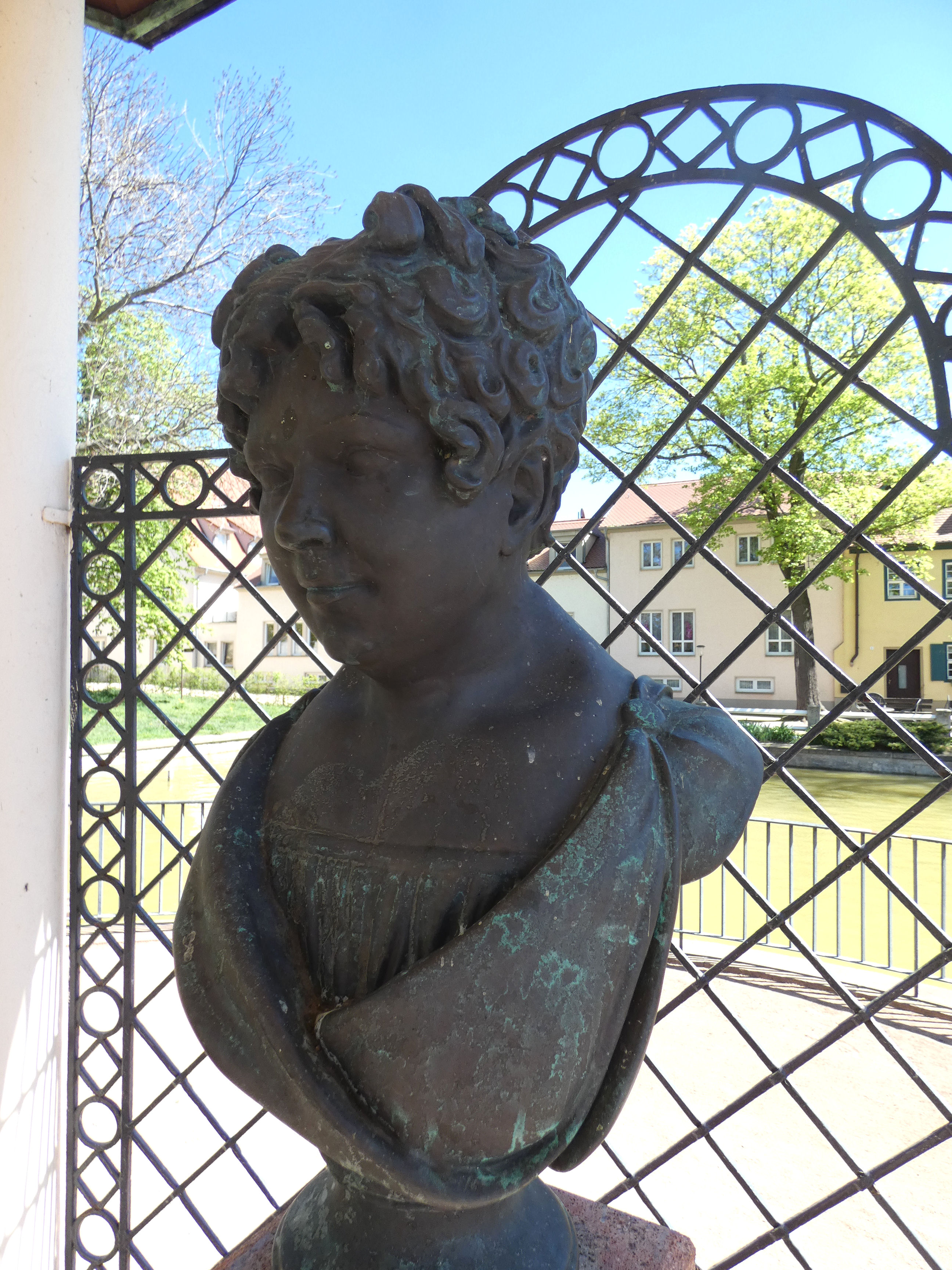 Büste der Christiane Vulpius in den Historischen Kuranlagen von Bad Lauchstädt